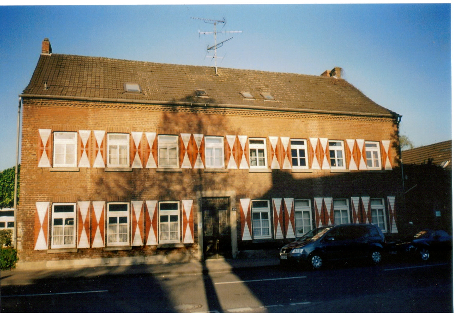 Köln-Fühlingen, Bauernhaus.jpg